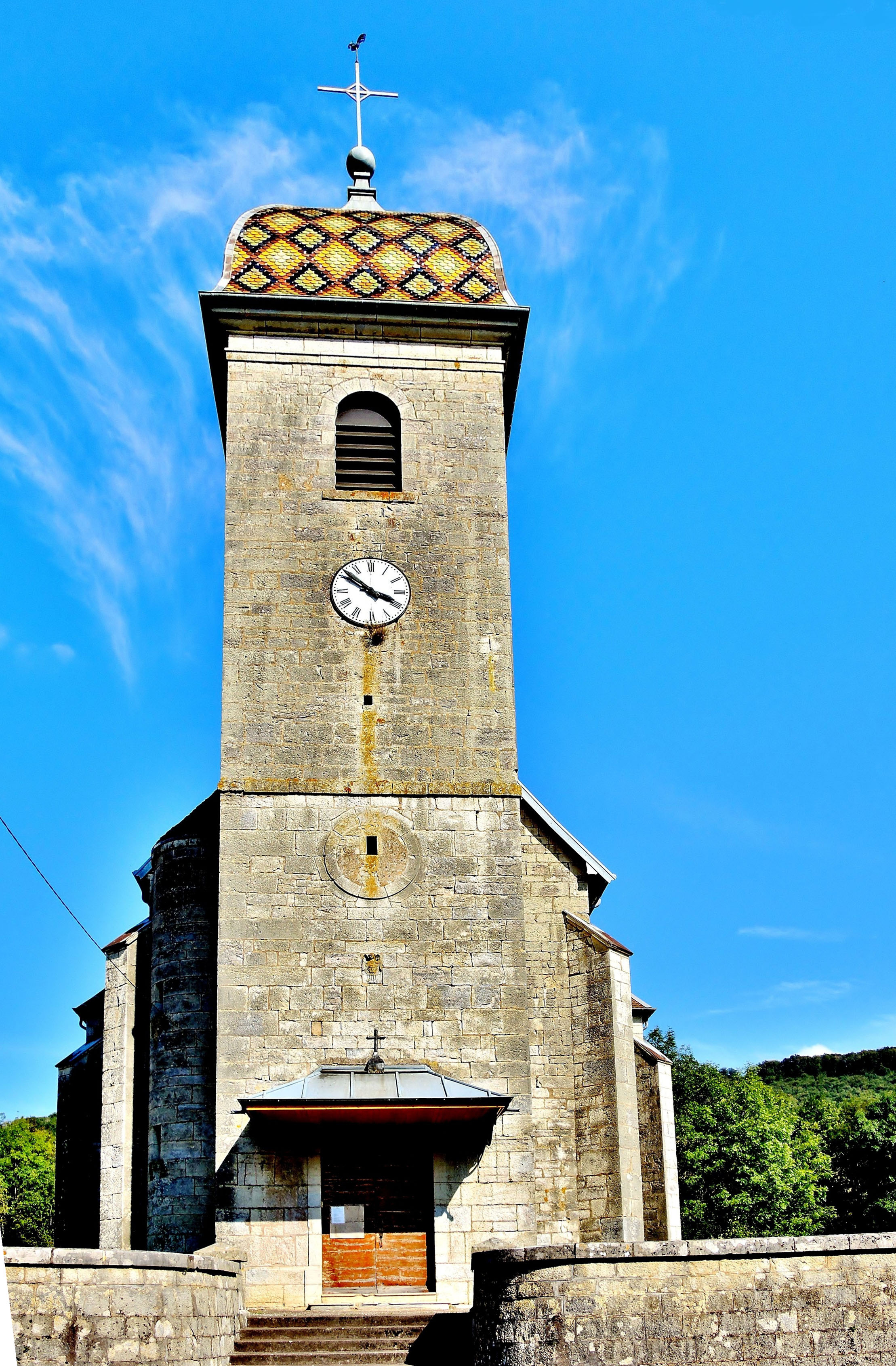 Façade de l'église Saint Pierre